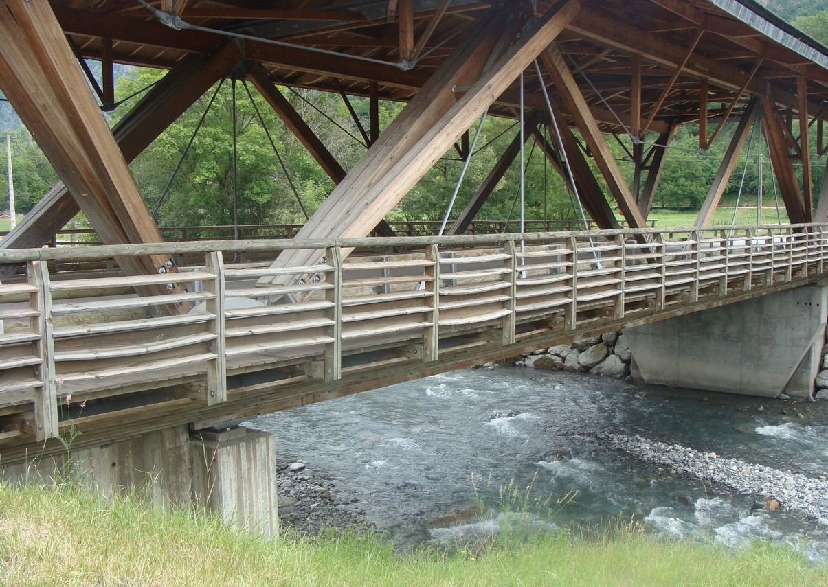 Le pont des Fayettes sur la Bonne à Valbonnais (Isère). Vue des parements latéraux.